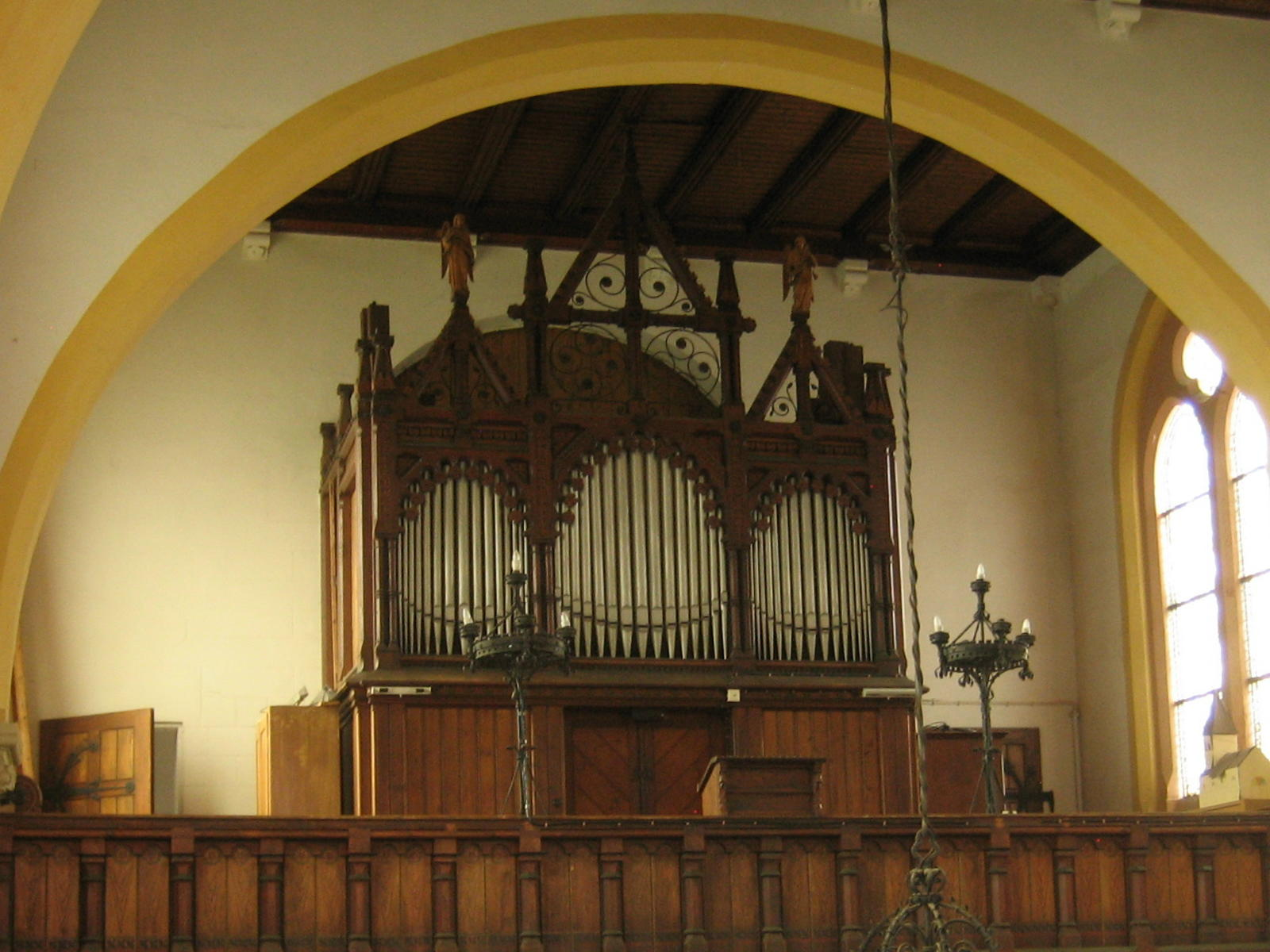 Kirche Großdobritz, Orgel von Orgelbauer Jahn, Dresden 1851, 1880 aus der alten Kirche ausgebaut, 1881 mit neuem Gehäuse in die neue Kirche eingebaut